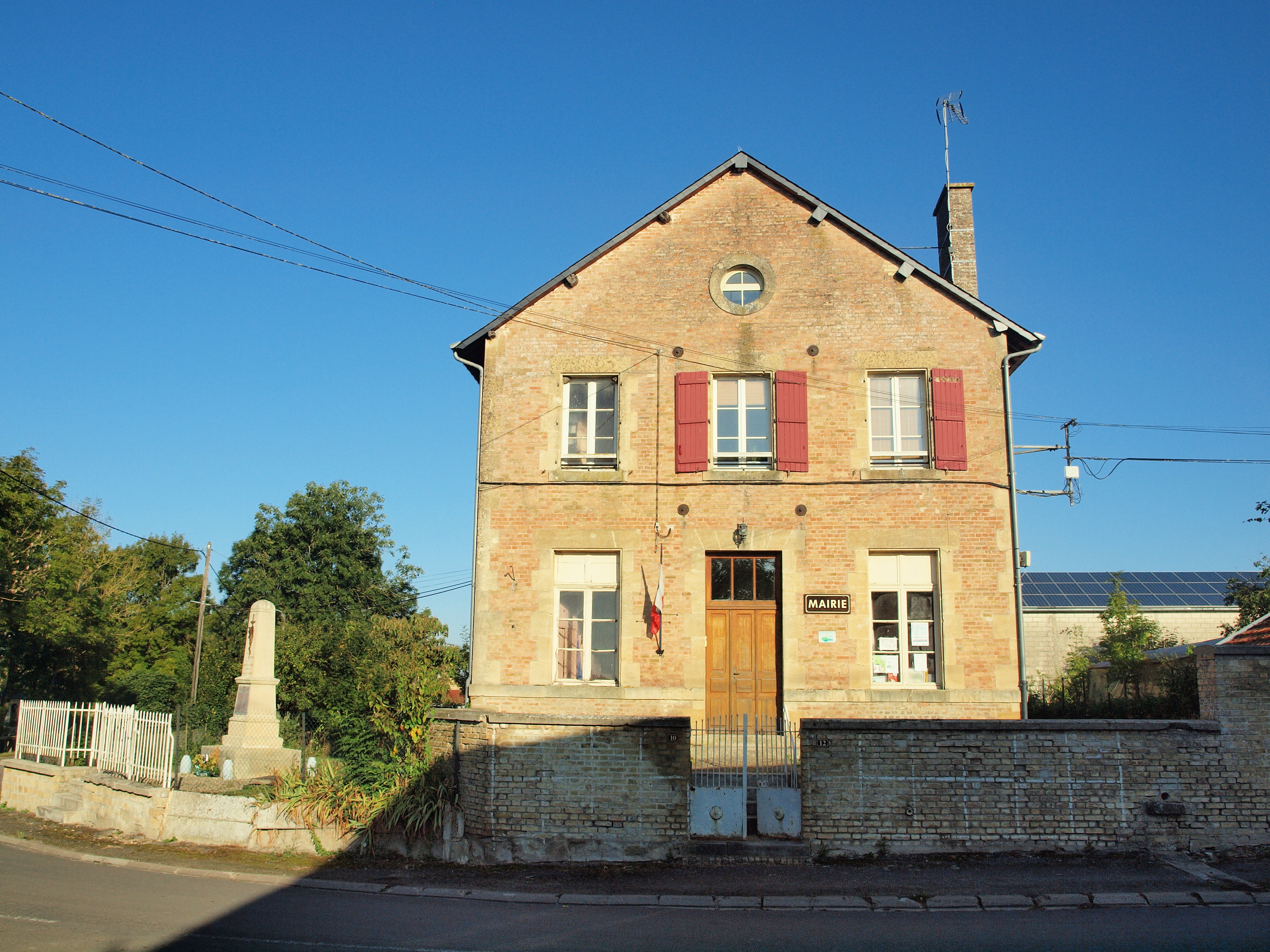 Chuffilly-Roche (Ardennes, France)